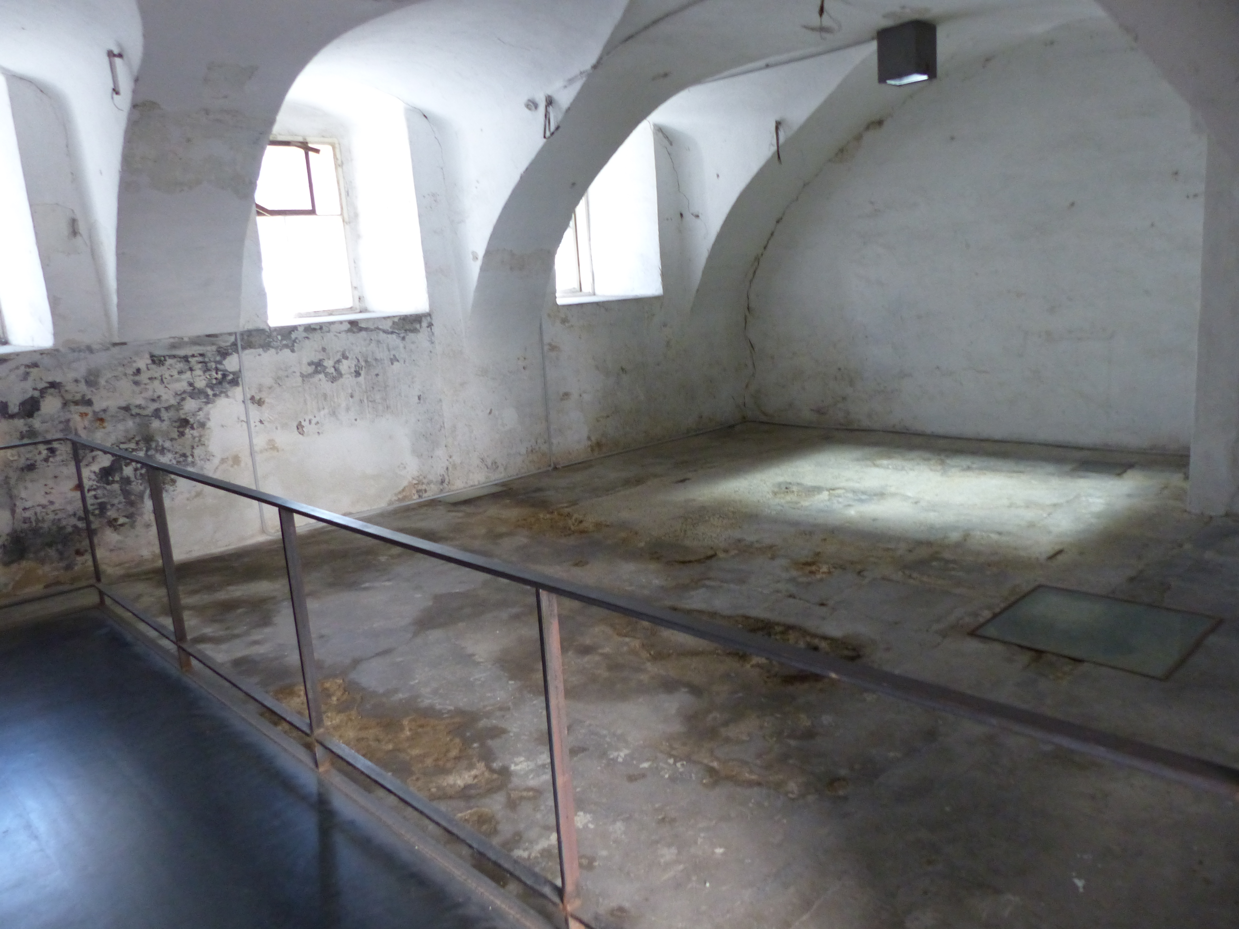 Schloss Hartheim Krematorium